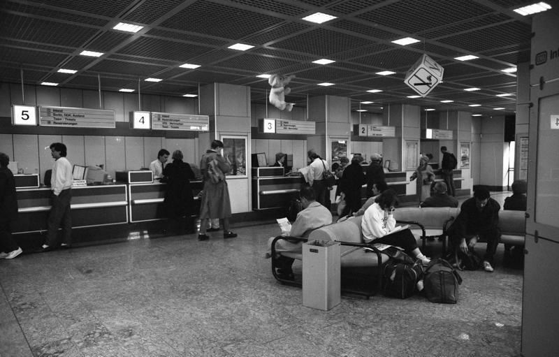 13.3.1989 Bonn - Hauptbahnhof, die neu gestaltete Schalterhalle